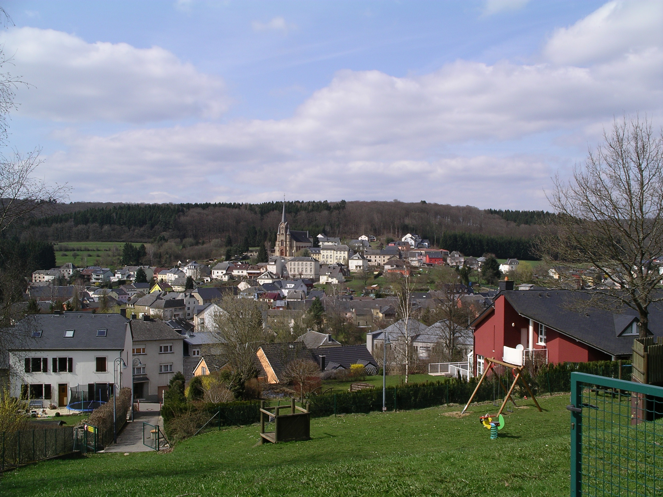 Blick auf Eischen, Gemeinde Hobscheid, Luxemburg